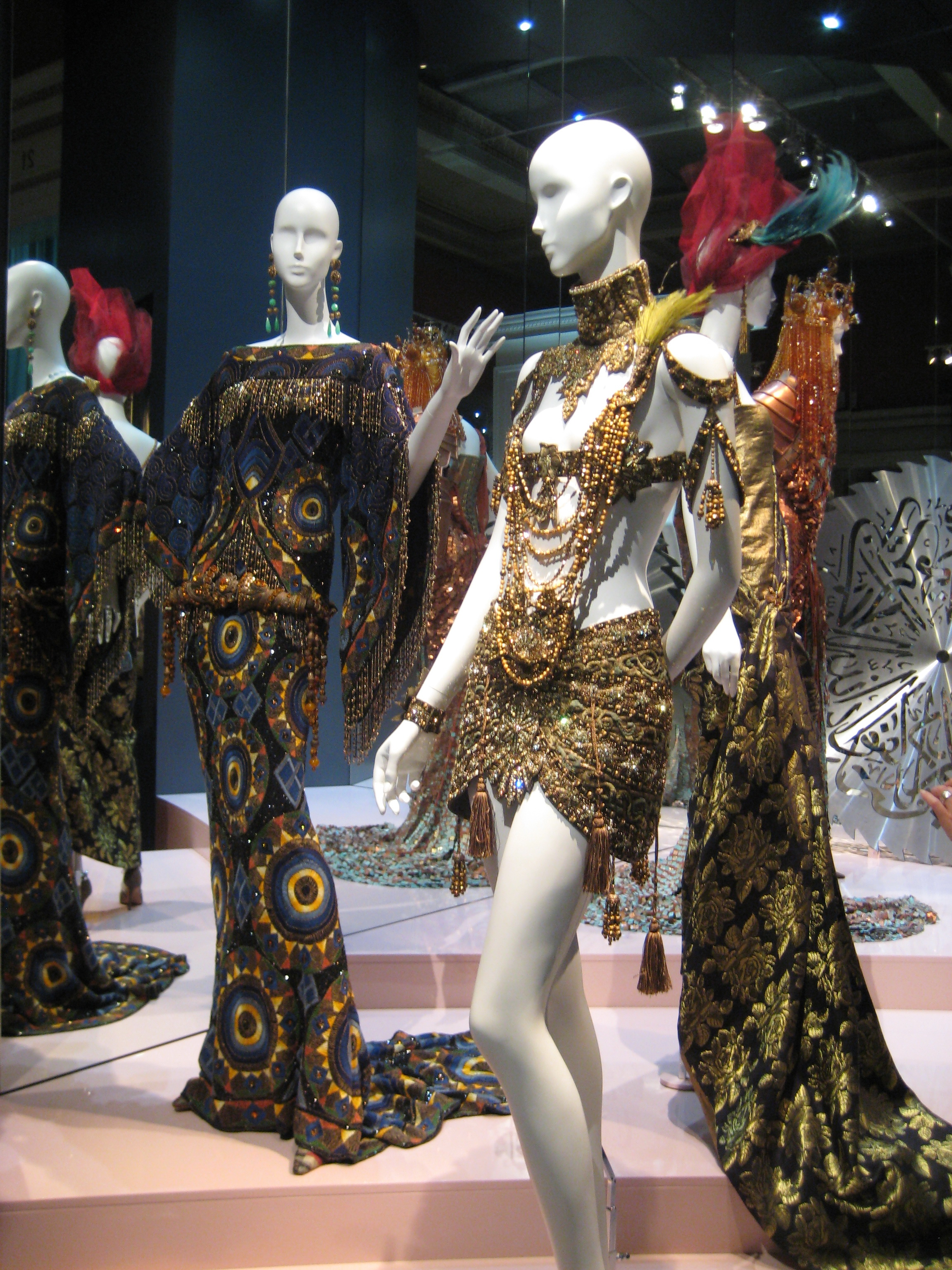 Выставка